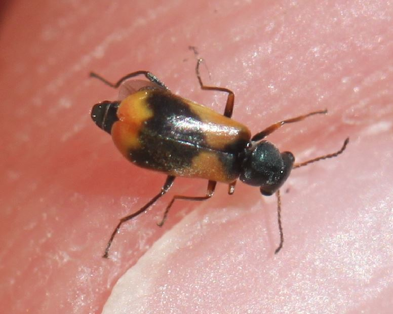 Anthocomus equestris am 22. April 2020